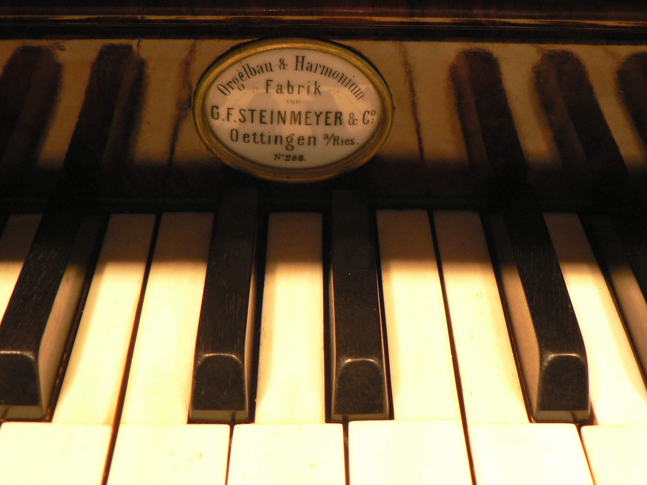 St. Marien Hof, Steinmeyer-Orgel Manualklaviatur